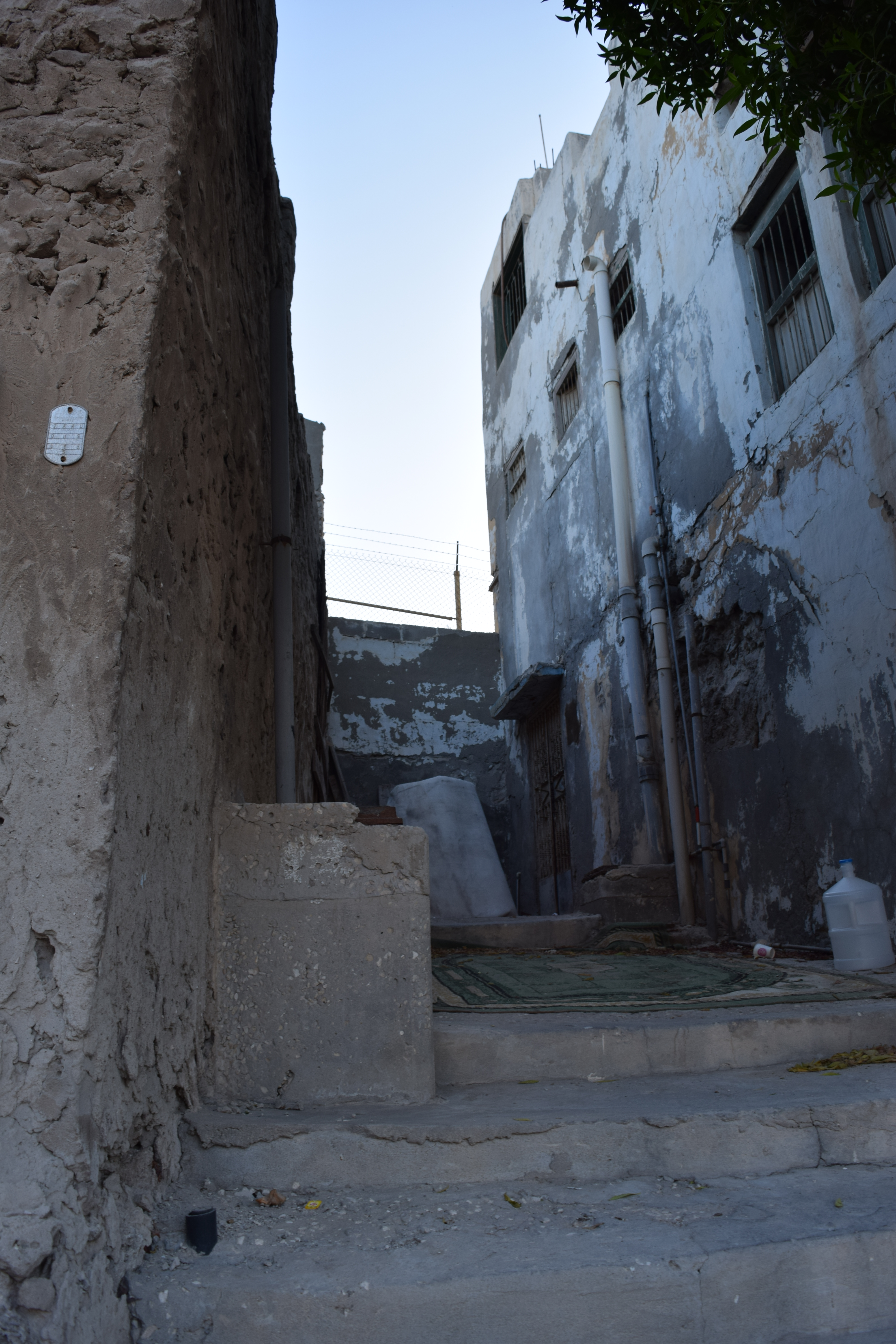 أزقة قلعة تاروت